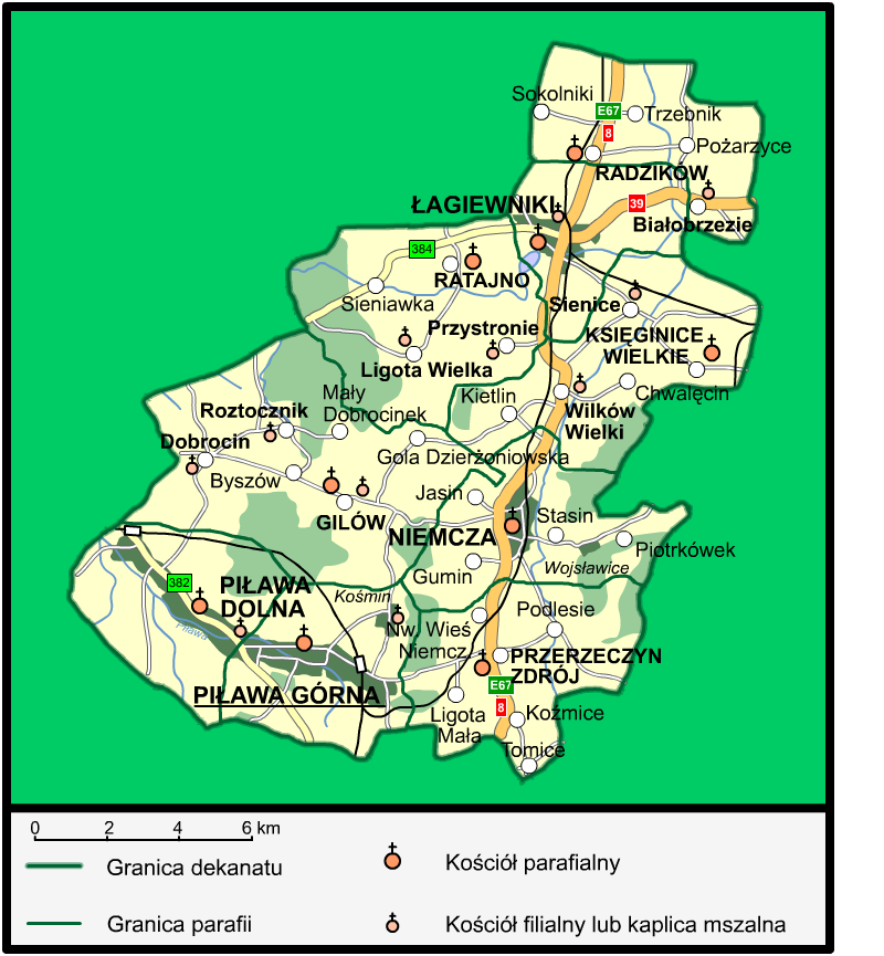 Mapa administracyjna dekanatu Piława Górna (diecezja świdnicka, metropolia wrocławska)